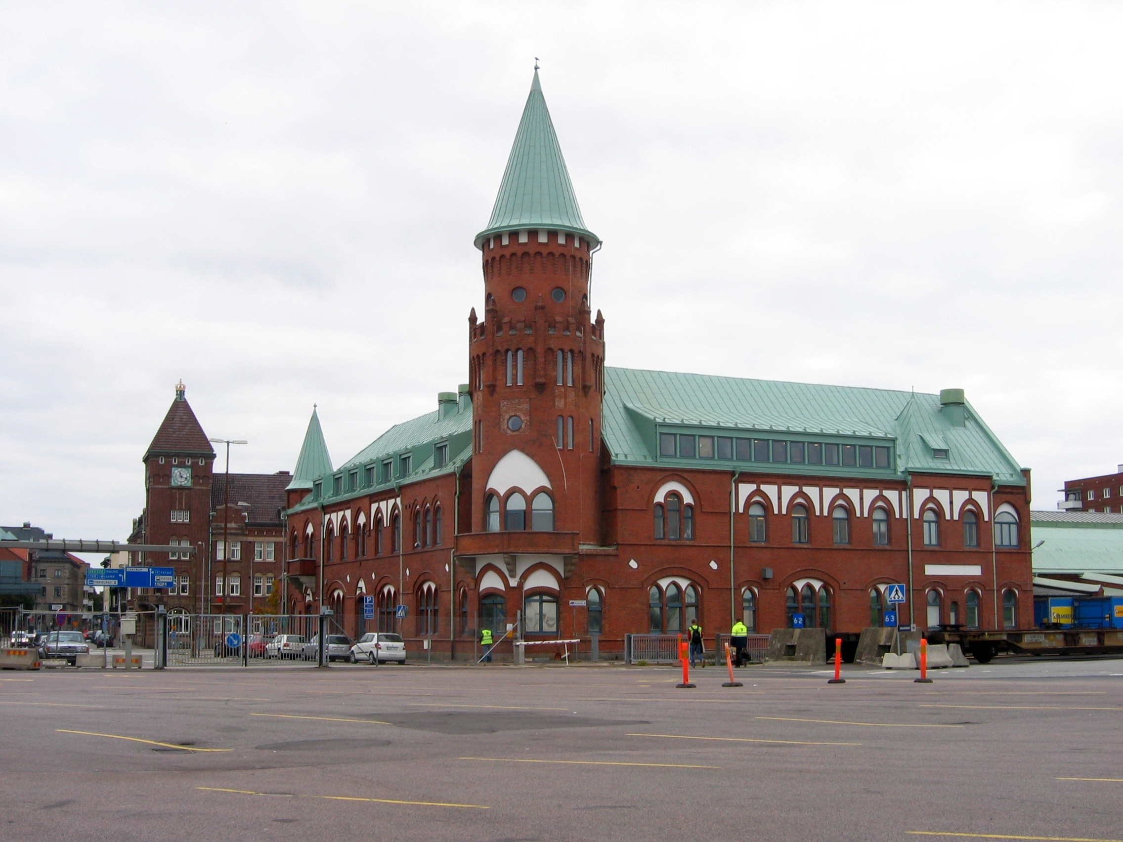 Südschweden 2007